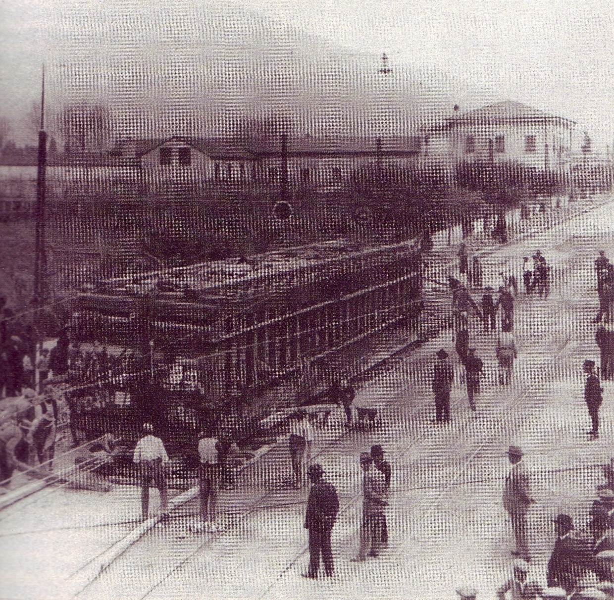 trasporto della colonna "Mussolini" imballata nel cassone di legno